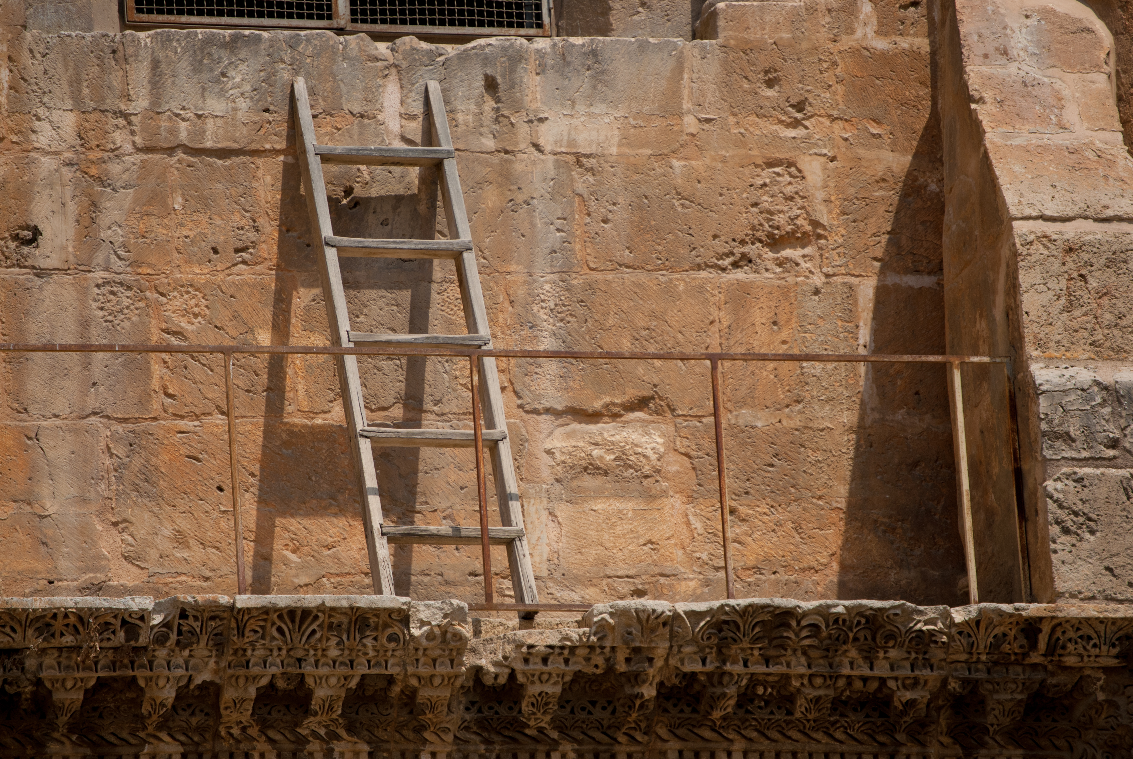 Echelle inamovible de l'église Saint-Sépulcre de Jérusalem en 2016